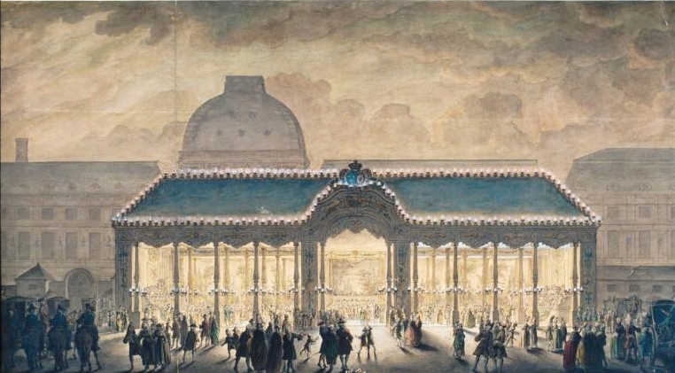 "Vue perspective de la place du Carrousel construite à l'occasion du mariage de Mgr le Dauphin, 26 février 1745." En arrière-plan, le palais des Tuileries. Lavis à l'encre de Chine et aquarelle, 40,5 x 78,5 cm, en provenance de la collection Hippolyte Destailleur.